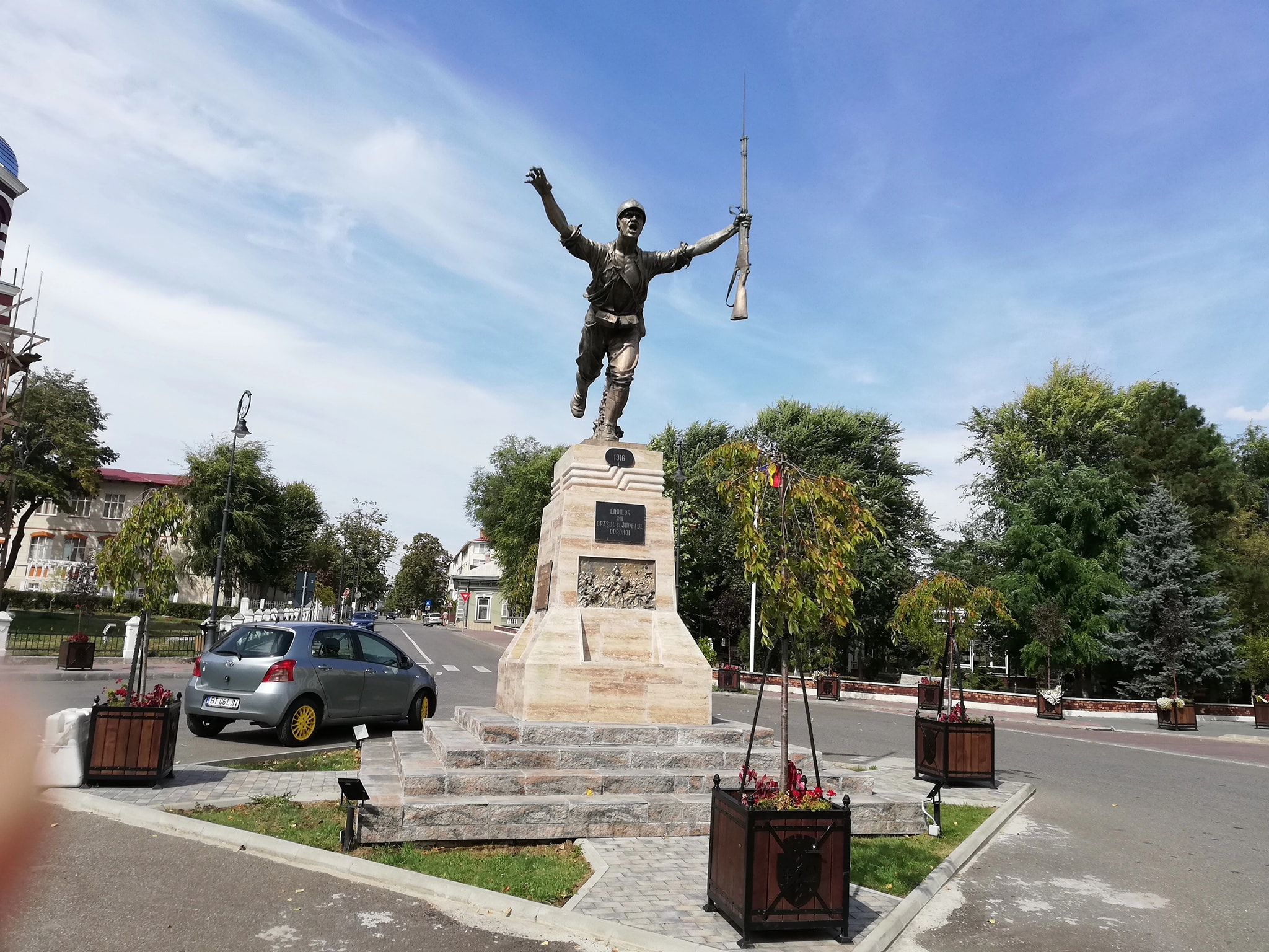 Construit in anul 1926, monumentul Eroilor din Dorohoi este un elogiu adus celor ce si-au pierdut viata in decurusul primului Razboi Mondial. Alaturi de celelalte monumente construite pe toata suprafata judetului si a pietrelor de marmura neagra ce impanzesc cimitirele, Monumentul Eroilor din Dorohoi este o aducere aminte a unor vremuri de rascruce in care romanii s-au ridicat si au luptat cot la cot pentru tara lor, pentru credinta lor si nu in ultimul rand, pentru ei insasi. Este realizat de catre sculptorul Spiridon Georgescu